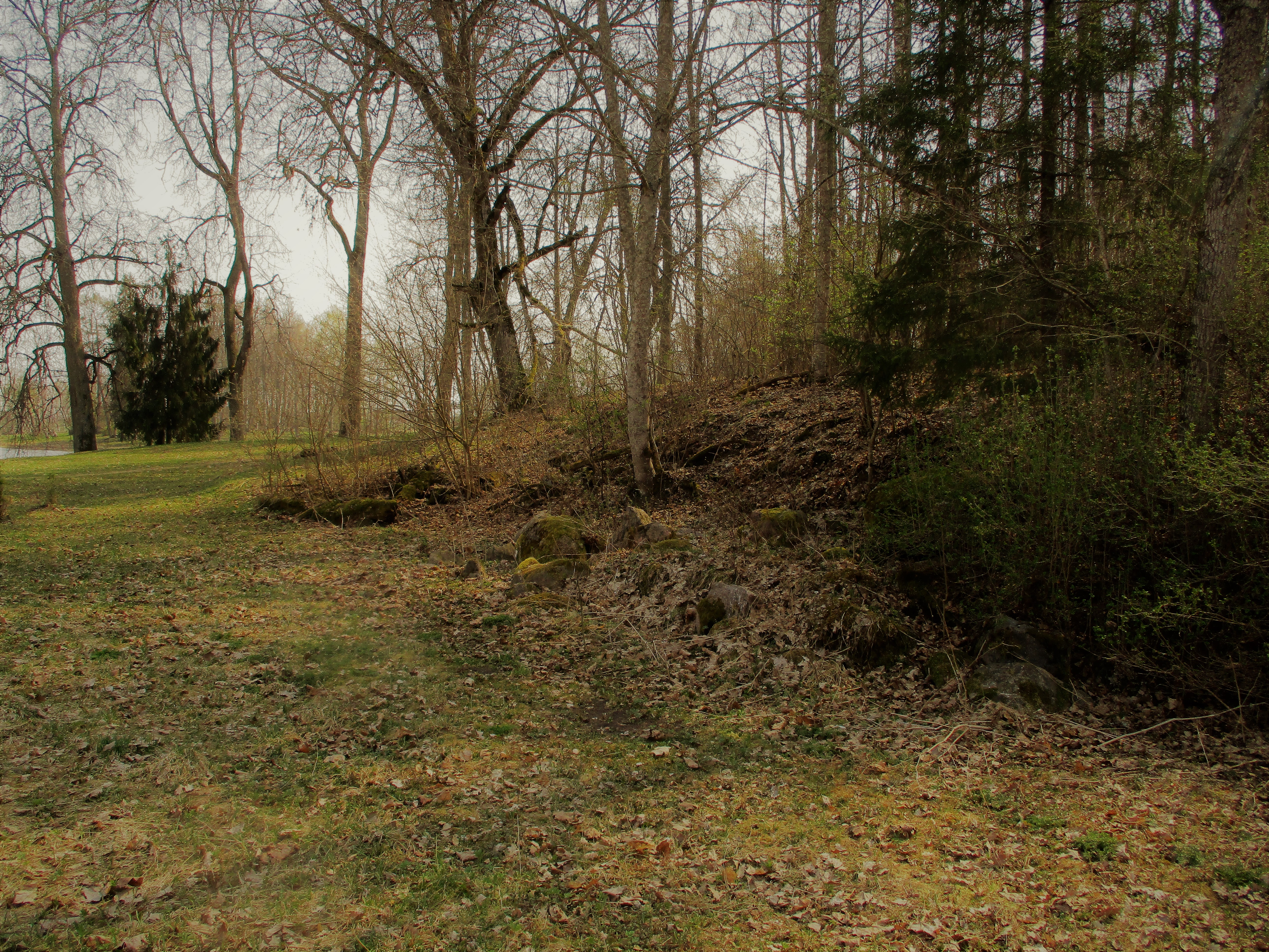 Oletatav linnuseala, vaade loodest linnuse põhjavallile. Vallist 50 m põhja poolt voolab Mõniste järvest välja oja.